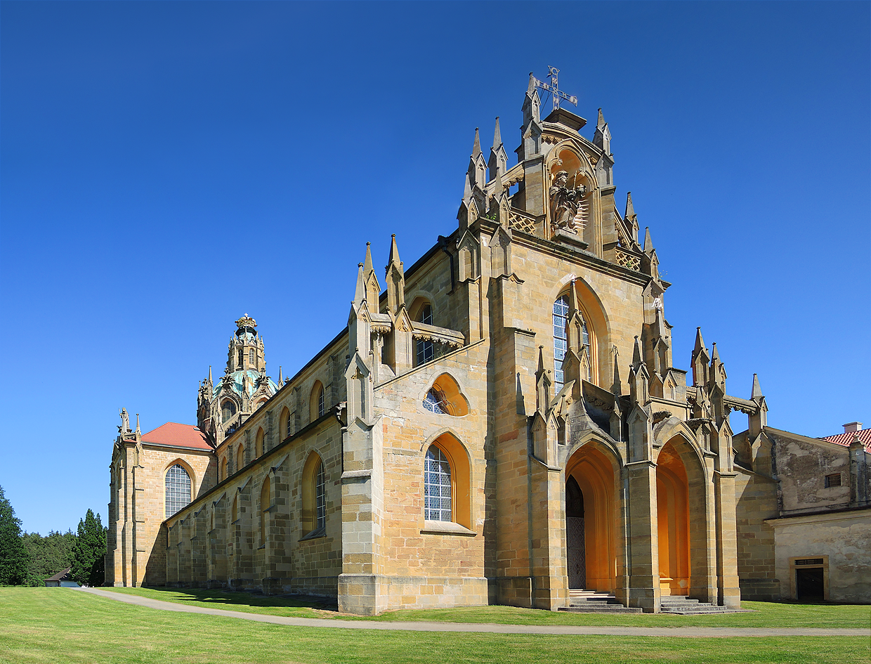 Klášter benediktýnů s kostelem Nanebevzetí Panny Marie, Kladruby 1, Kladruby (okres Tachov).